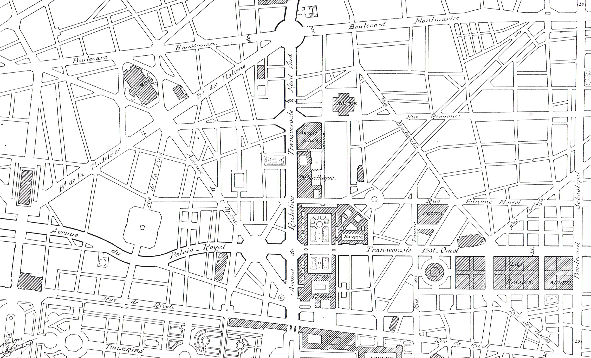 Plan-projet de la nouvelle grande croisée de Paris.